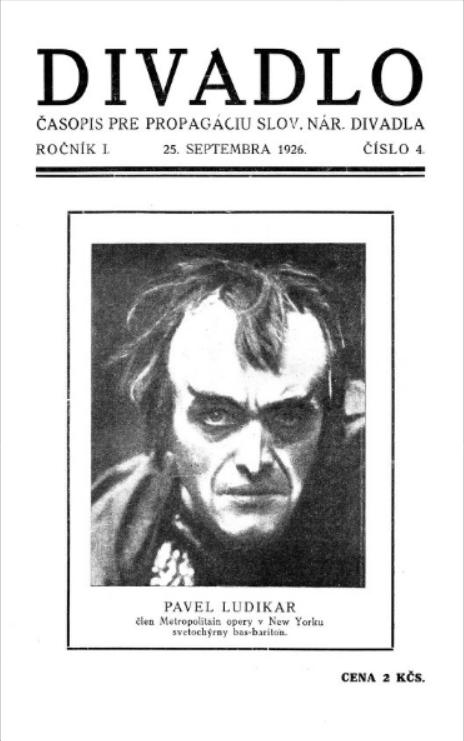 Titulný list časopisu Divadlo.